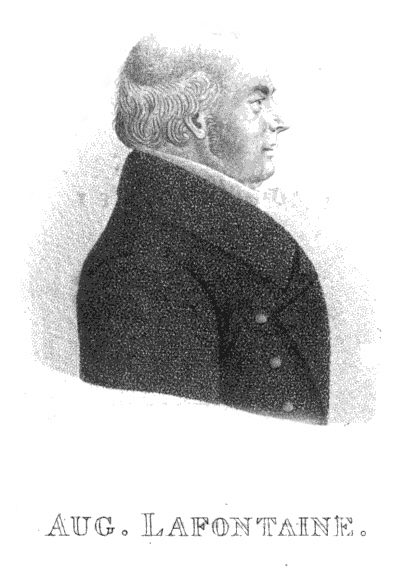 Portrait August Lafontaine